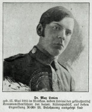 Max Levien (1885-1937), KPD-Vorsitzende, Münchner Räterepublik 1919. Detail aus: "Das Ende der Räterepublik in Bayern" Erscheinungsort: (München) Herausgeber: Eder Erscheinungsjahr: (1919) Anzahl der Seiten: 28